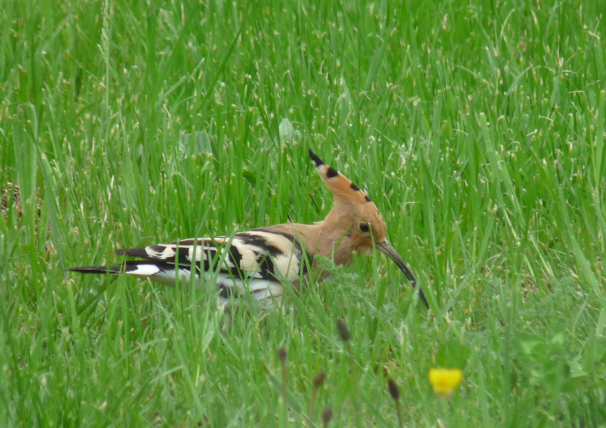 Upupo fotita printempe en la potevia marĉo (francio).